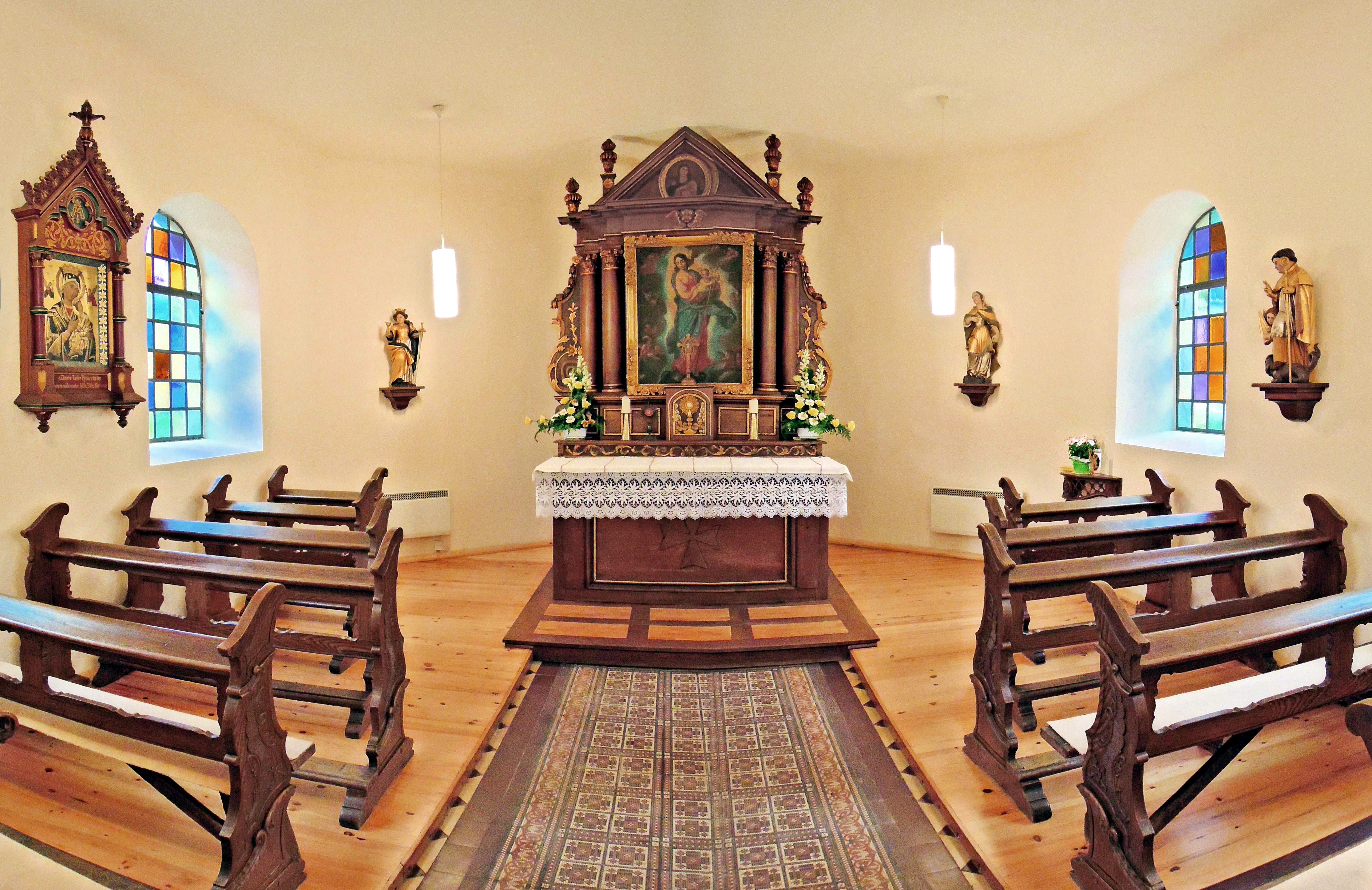 Körpricher Straße, kath. Kapelle St. Luzia, 1811 (Einzeldenkmal)